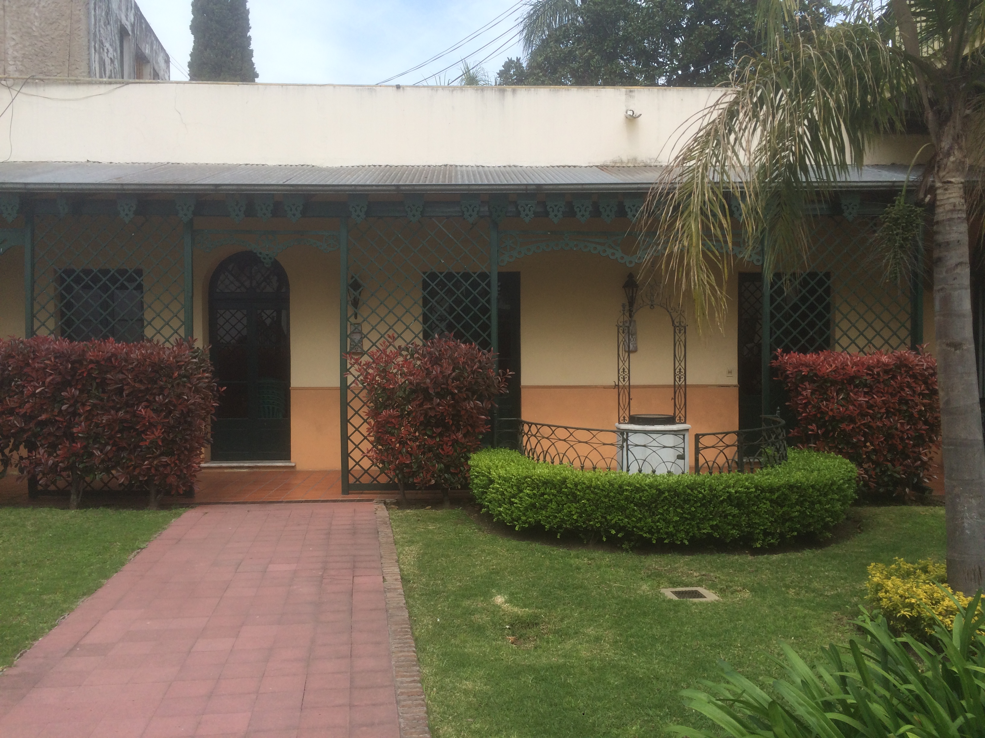 Fondo de la casa de Fernando Alfaro, donde de posteriormente vivió uno de sus hijos.